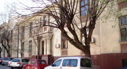 Фотографија зграде на Косанчићевом венцу 19 где је Н. Граовац имао атеље, аутор фотографије Nicolo